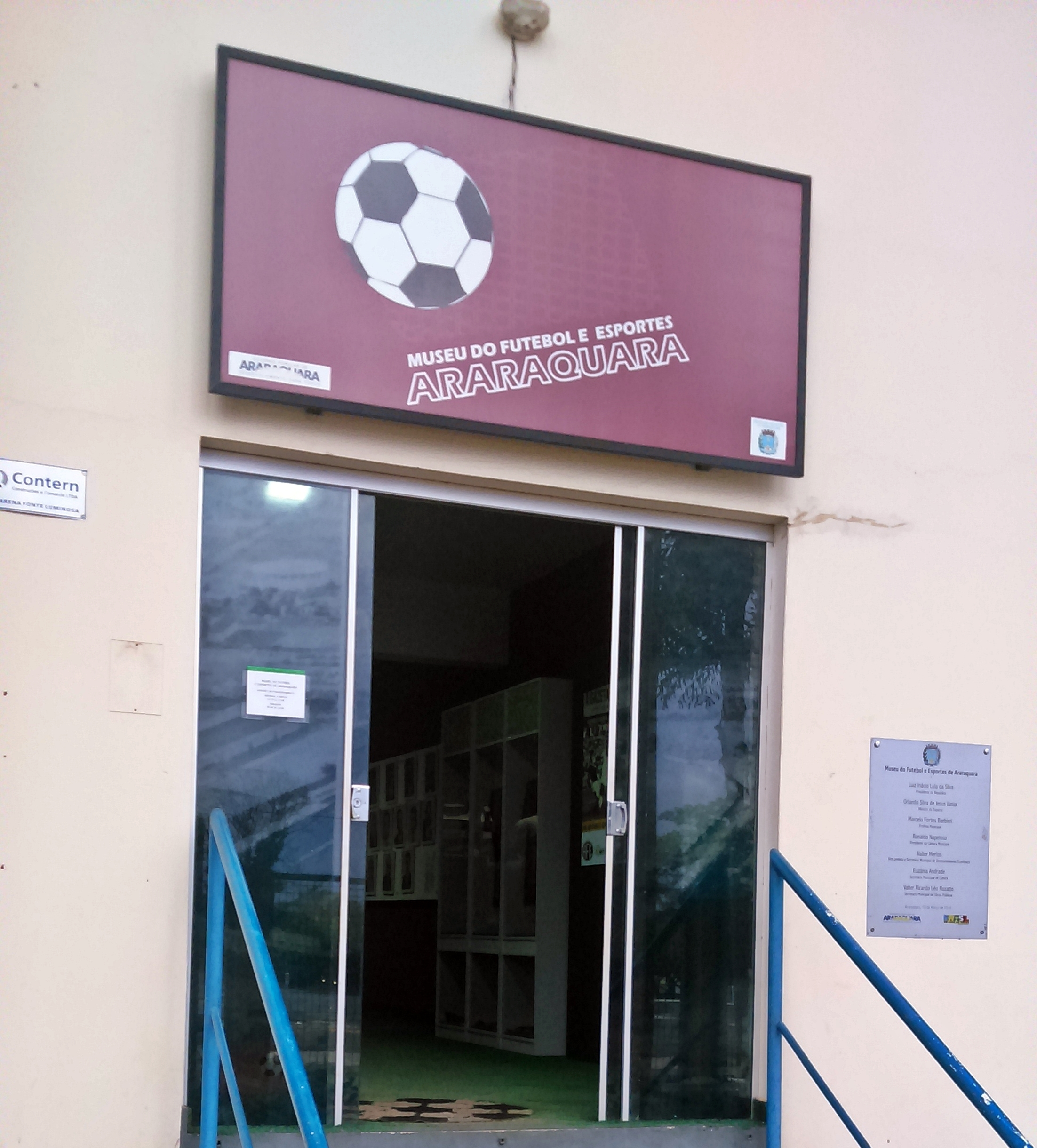 Entrada do Museu de Futebol e Esporte de Araraquara